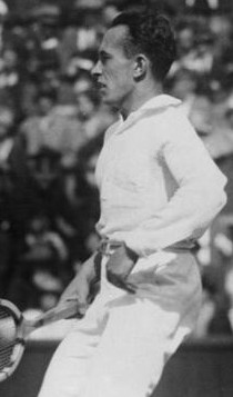 Frankreichs Verteidigung des Davis-Pokals ! Eine Wimbledon-Aufnahme der französischen Vertreter Brudnon (links) und Cochet (rechts). Brudnon in erhöhter Aktion beim Kampf gegen Amerikaner Tilden-Lott.